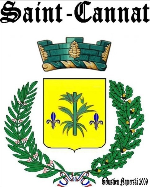 Blason de la ville de Saint-Cannat